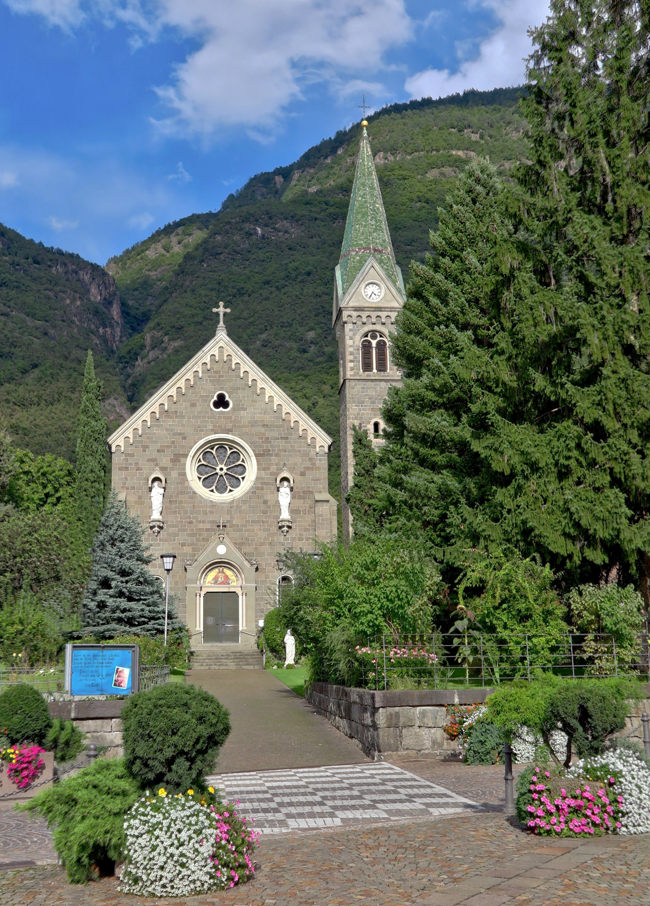 Italien, Südtirol, Provinz Bozen, Gargazon: Pfarrkirche 'Herz Jesu'